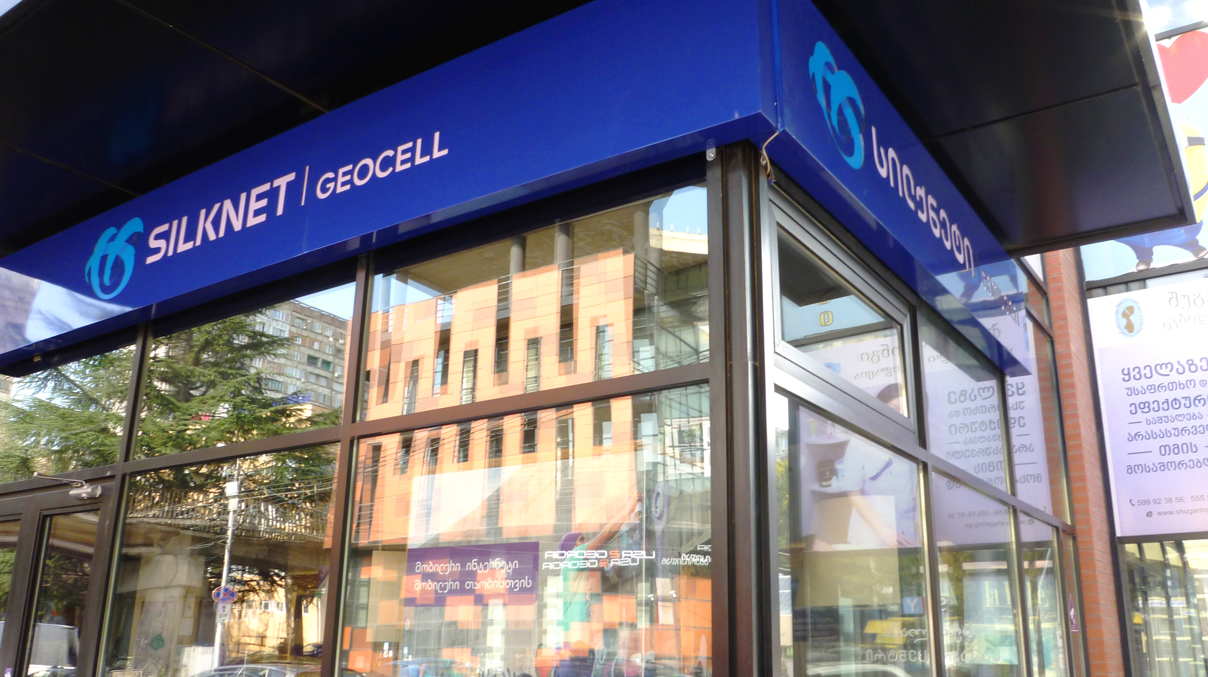 სილქნეტის სერვის ცენტრი ჯეოსელის ქვებრენდით